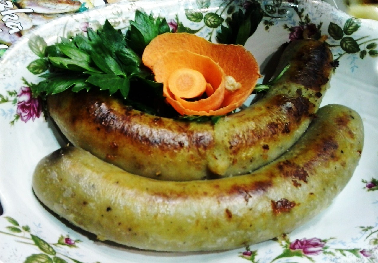 „Kiszka szwedzka”. Produkt wpisany 6 marca 2012 na Listę produktów tradycyjnych Ministerstwa Rolnictwa i Rozwoju Wsi w kategorii „Gotowe dania i potrawy” w woj. zachodniopomorskim.